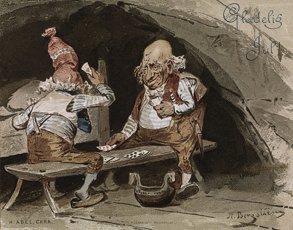 Postkort / julekort / overrekkelseskort / kartongkort.Utgiver / Publisher: H. Abel (Christiania)